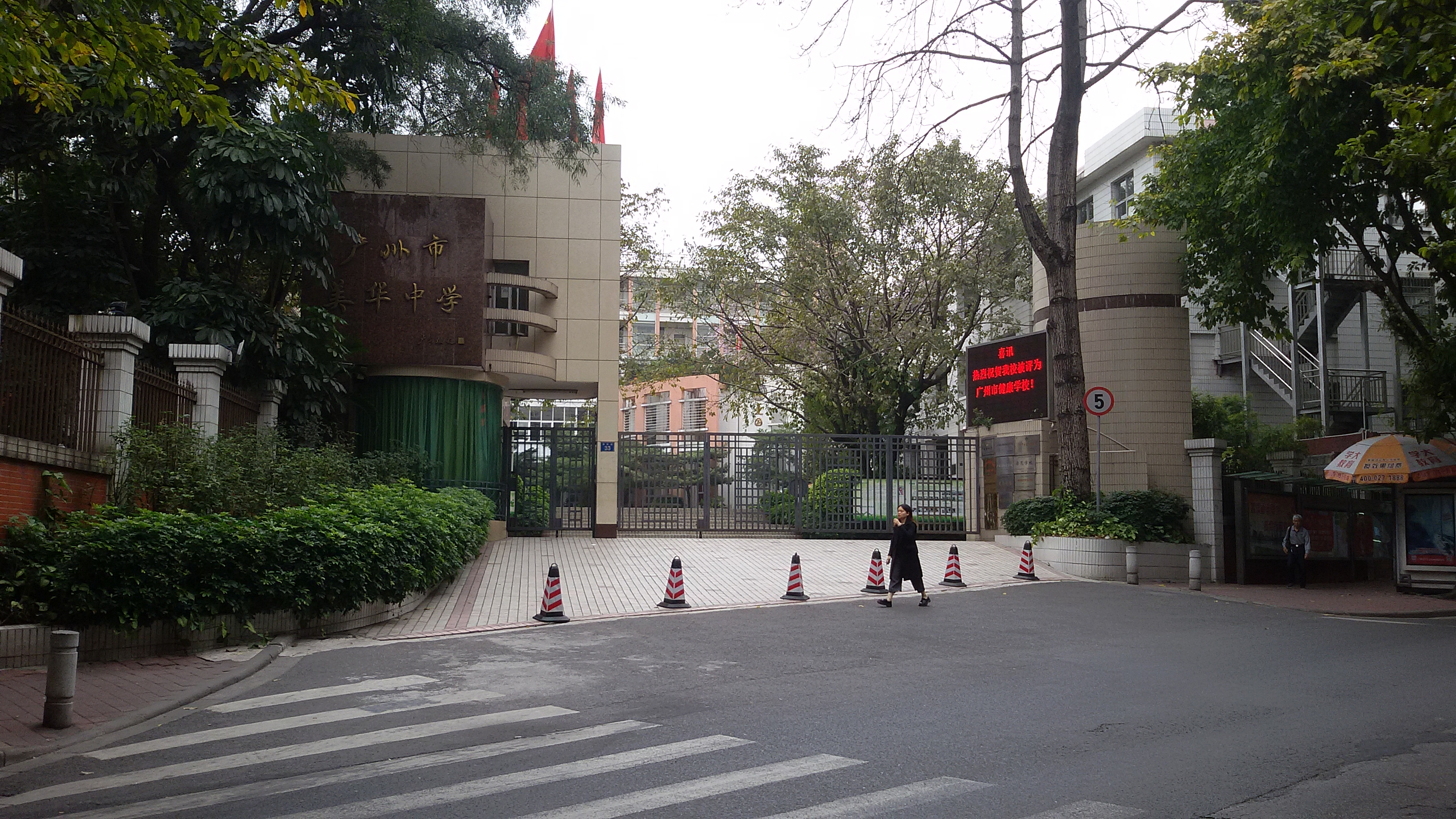 粵語: 廣州市美華中學嘅正門